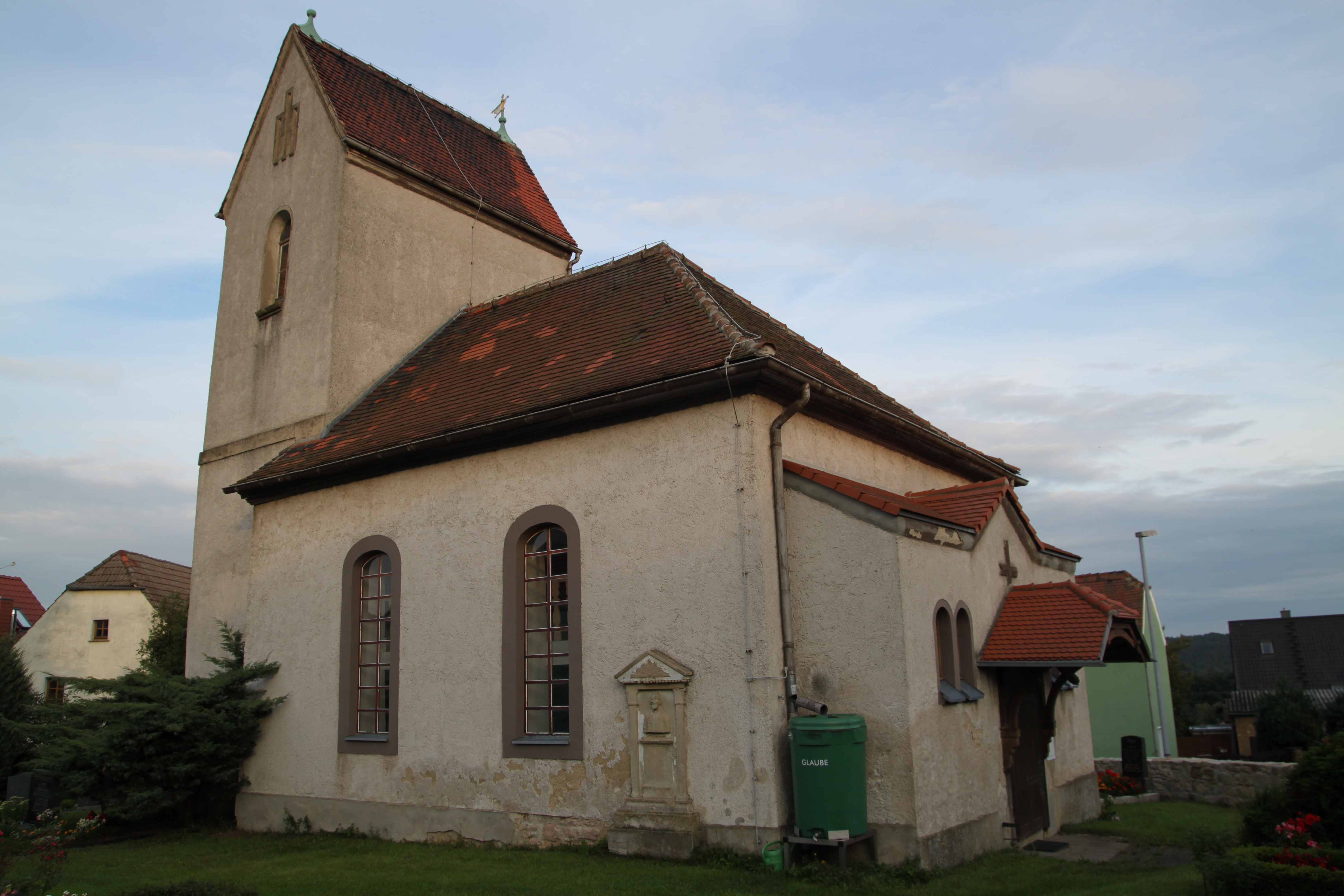 Mühlsdorf, Dorfkirche, Schiff